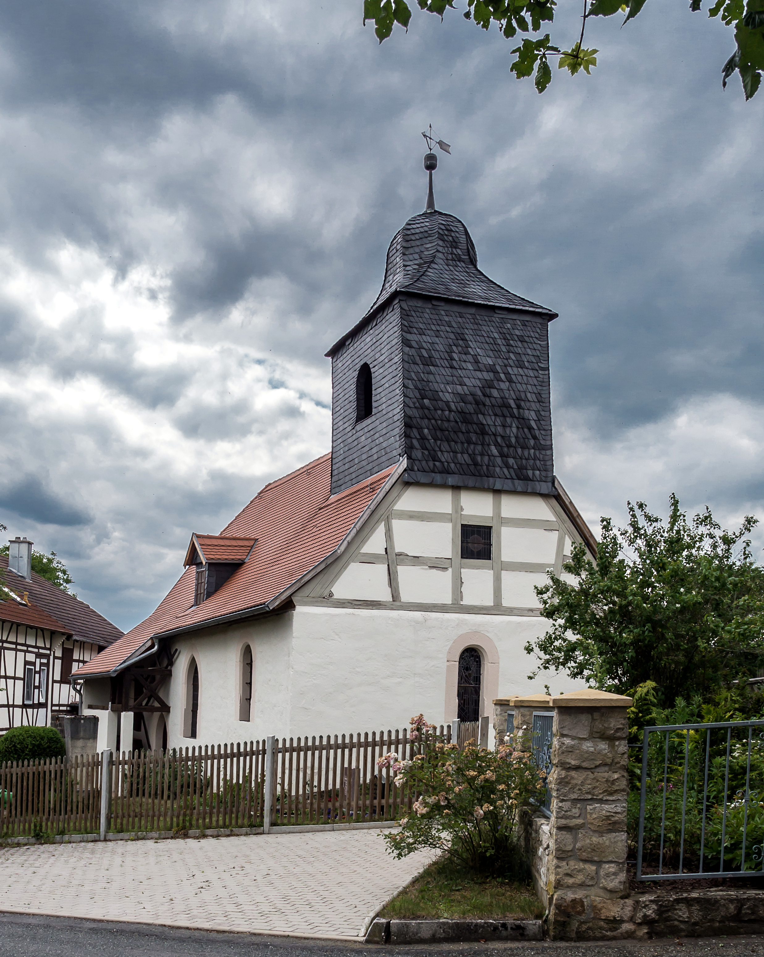 Kulturdenkmal in Uhlstädt-Kirchhasel, Kirche mit Ausstattung Gemeinde Rödelwitz Nr.25